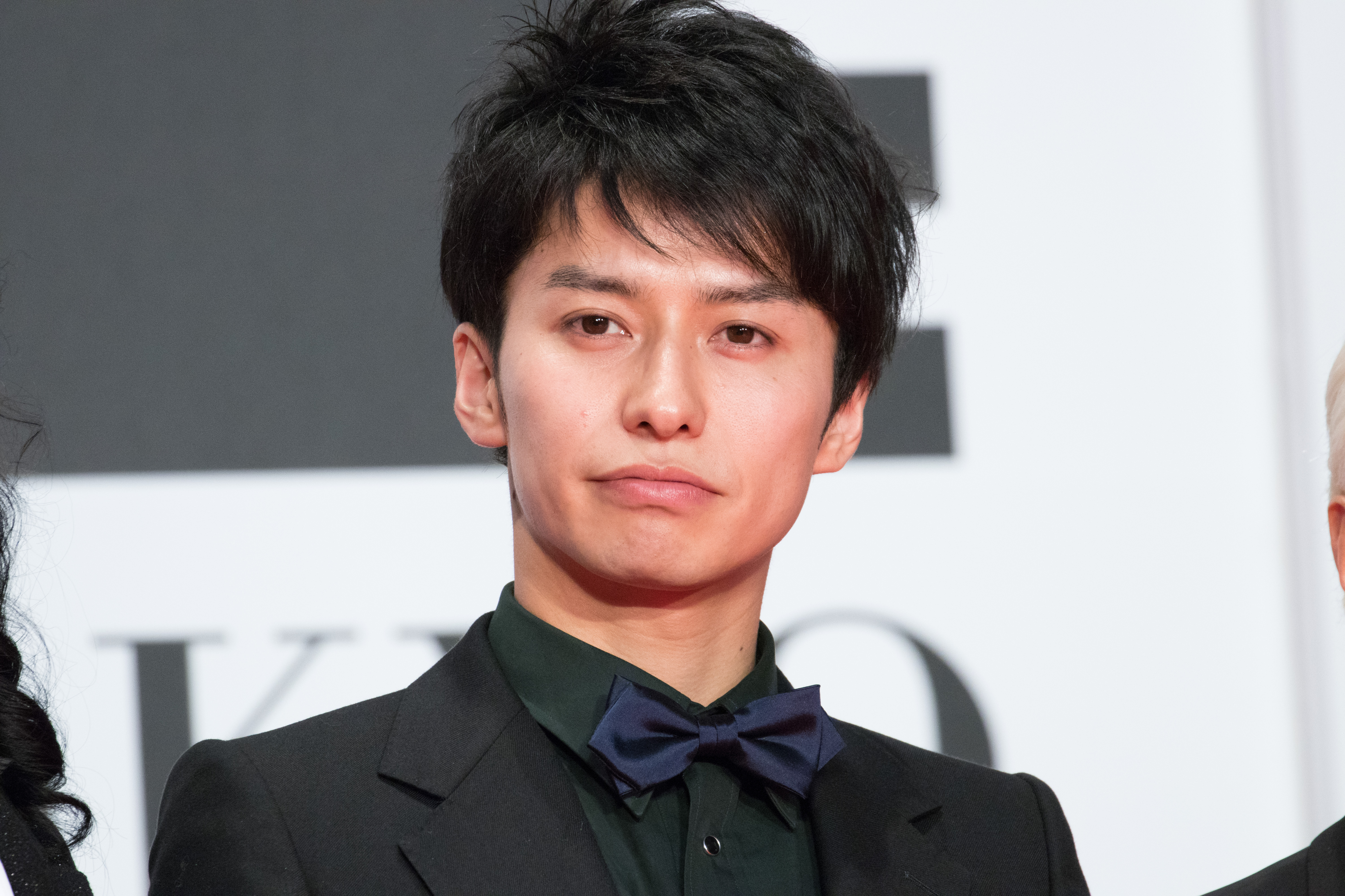 第29回 東京国際映画祭 オープニングセレモニー 武田航平 (星くず兄弟の新たな伝説)